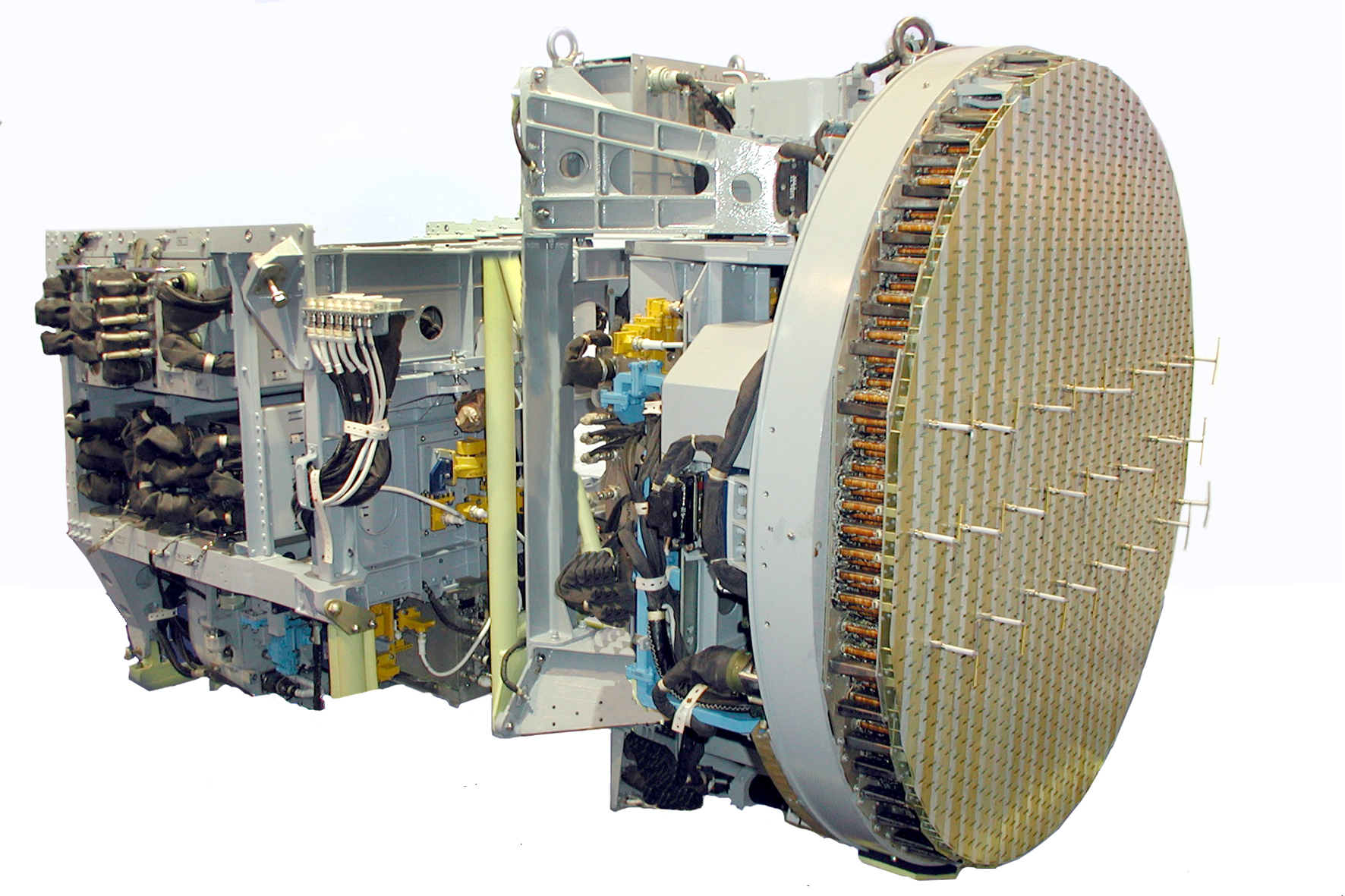 Радиолокационная система управления Н011 «БАРС»